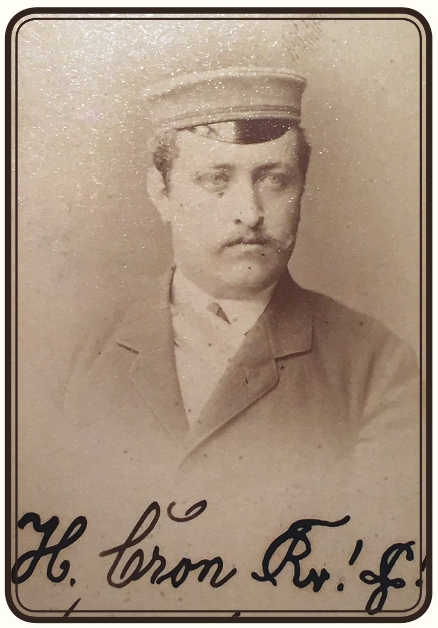 Porträtfotografie von Heinrich Cron